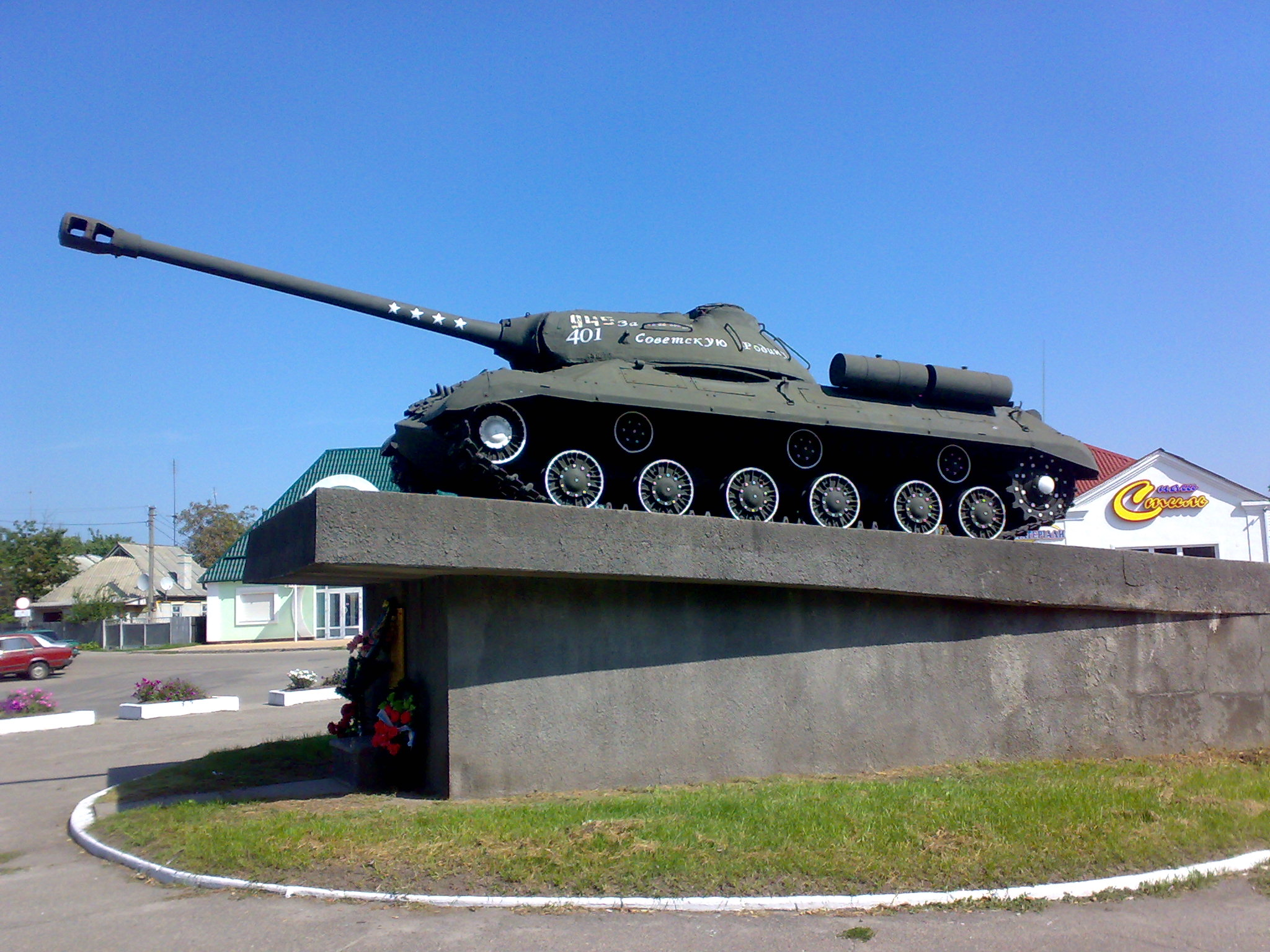 пам'ятник-танк у Миронівці